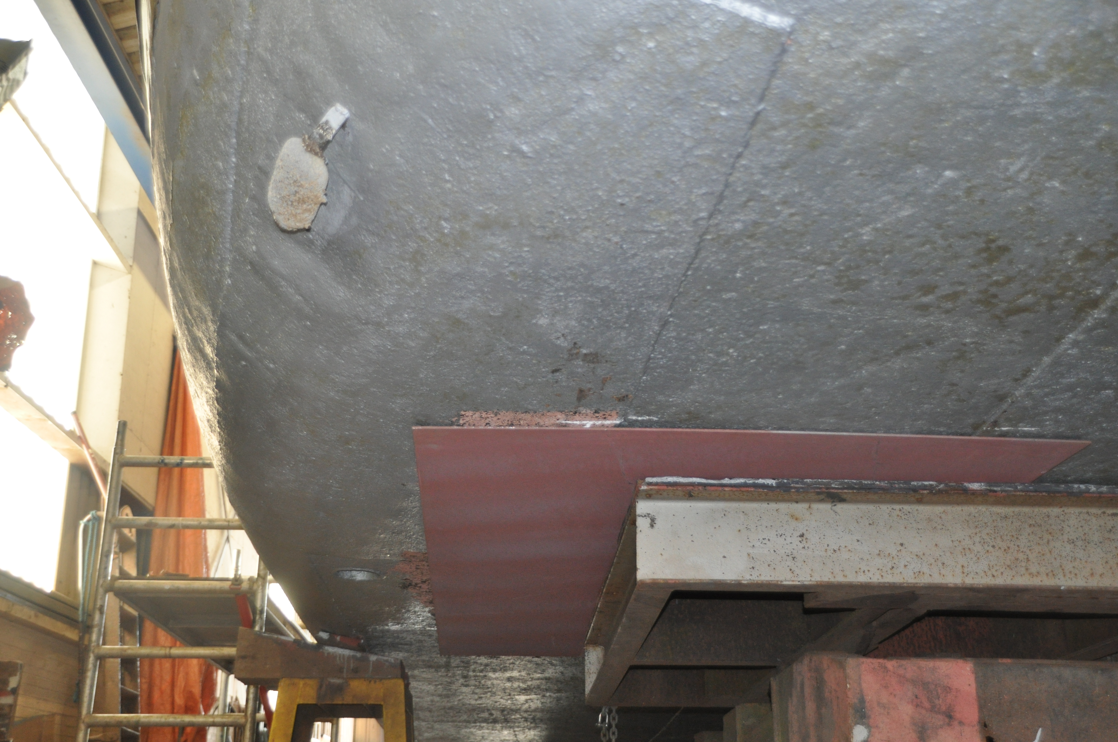 Het aanbrengen van een dubbelplaat onder de Stella Maris.